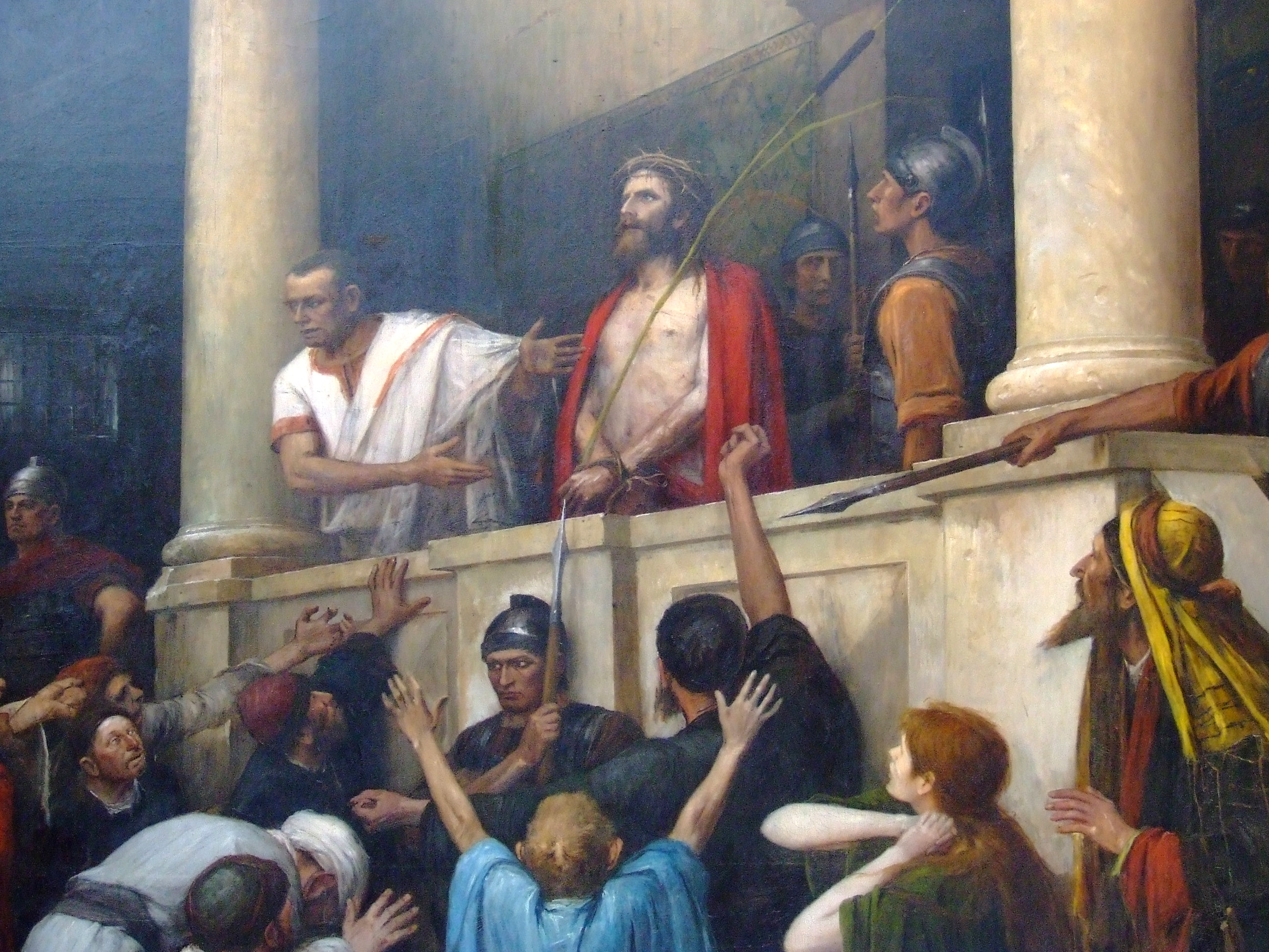 Munkácsy Mihály: Ecce Homo! (részlet)